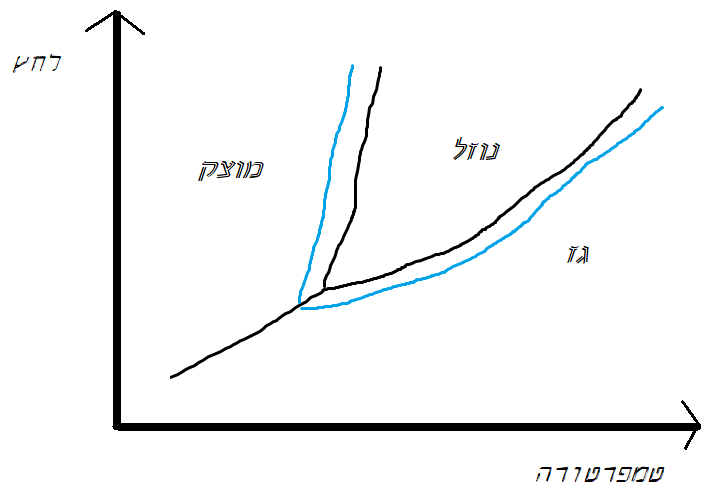 דיאגרמת פאזות של ממס טהור לעומת תמיסה